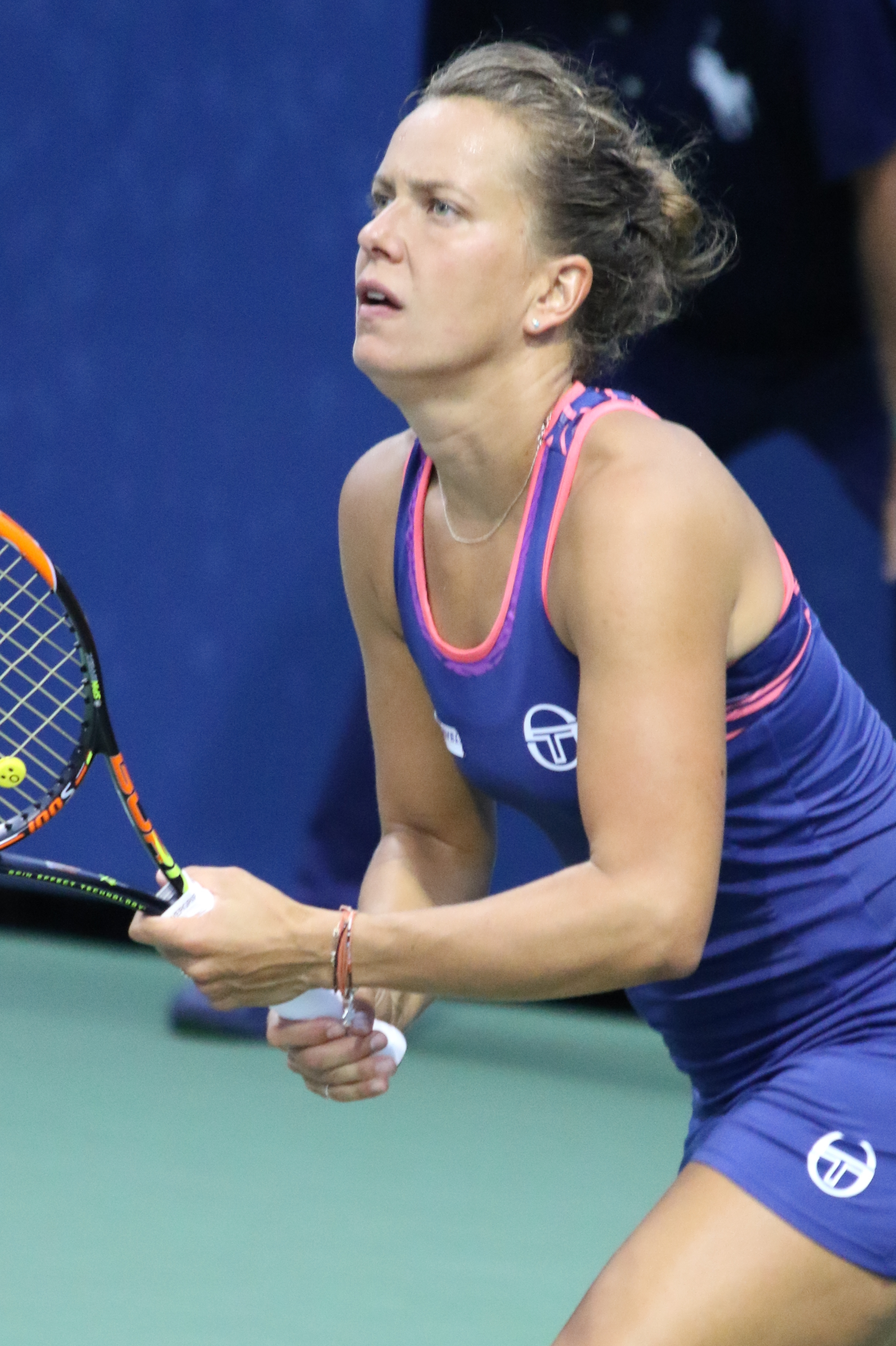 Strycova US16 (20)